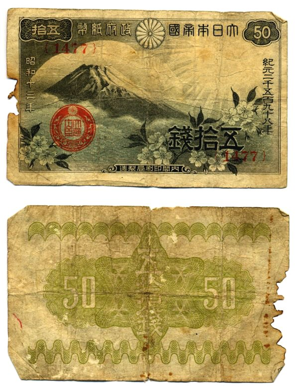 Japanese_50sen_bill